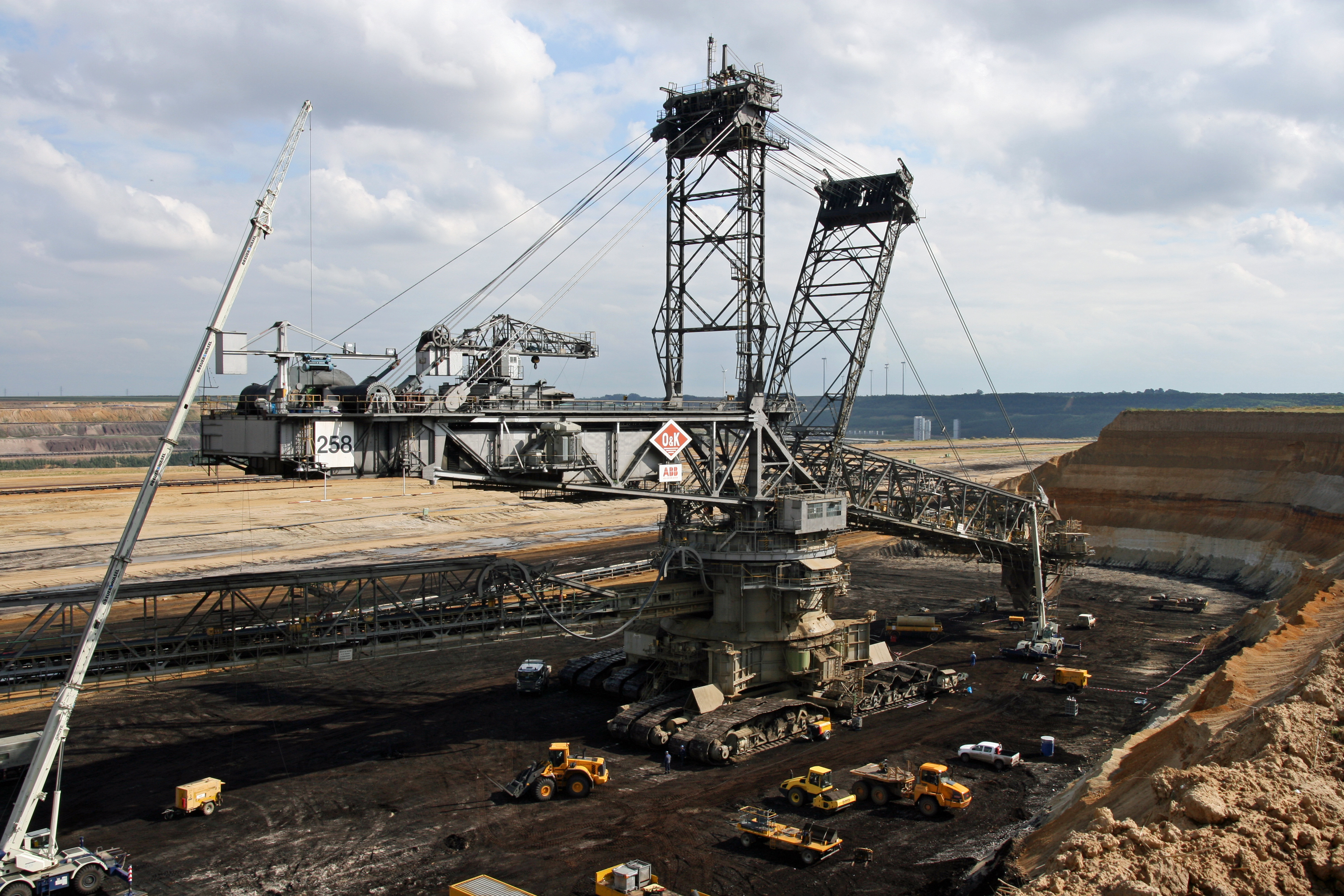 Tagebau Garzweiler, Schaufelradbagger Nr. 258